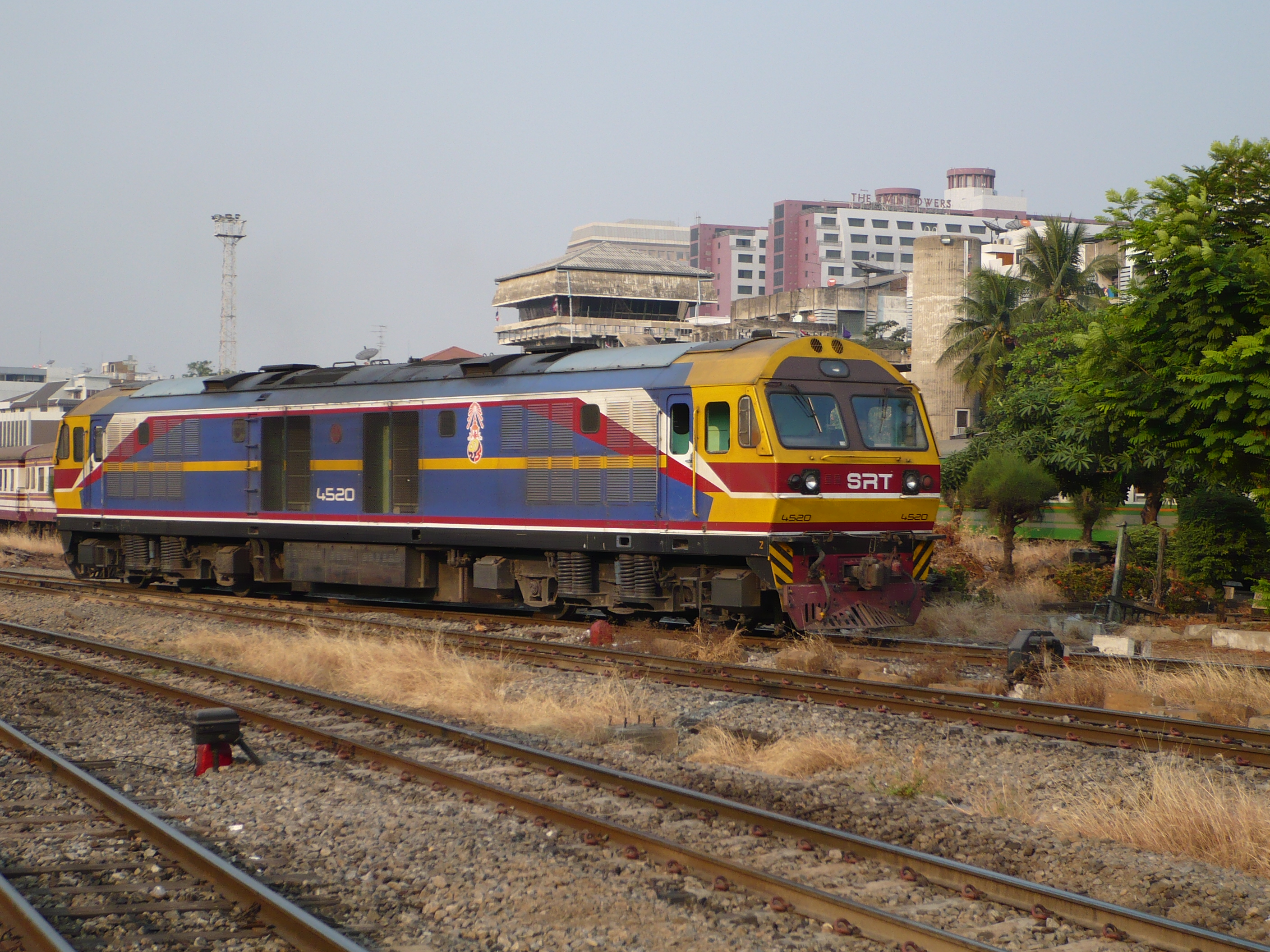 Локомотив Hitachi 8FA-36C №4520 на подъезде к станции Хуа Лампонг в Бангкоке